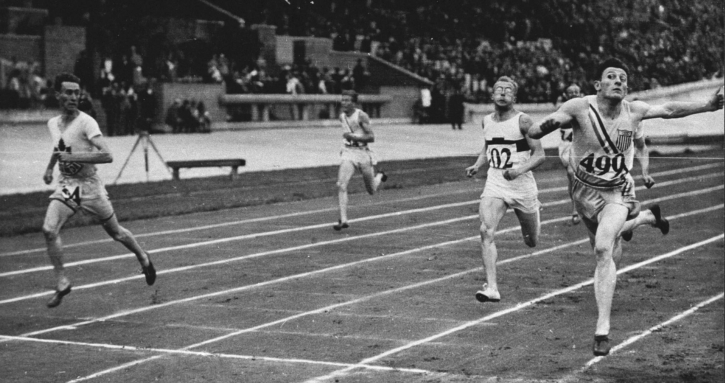 Olympische Spelen 1928 te Amsterdam. Atletiek 400 meter finale. Foto de finish winnaar de Amerikaan Raymond Barbuti (rechts) in een tijd van 47.8, tweede de Canadees James Ball (links) in een tijd van 48.0, en derde de Duitser Joachim Büchner (midden) in een tijd van 48.2. Olympisch stadion 3 augustus 1928.